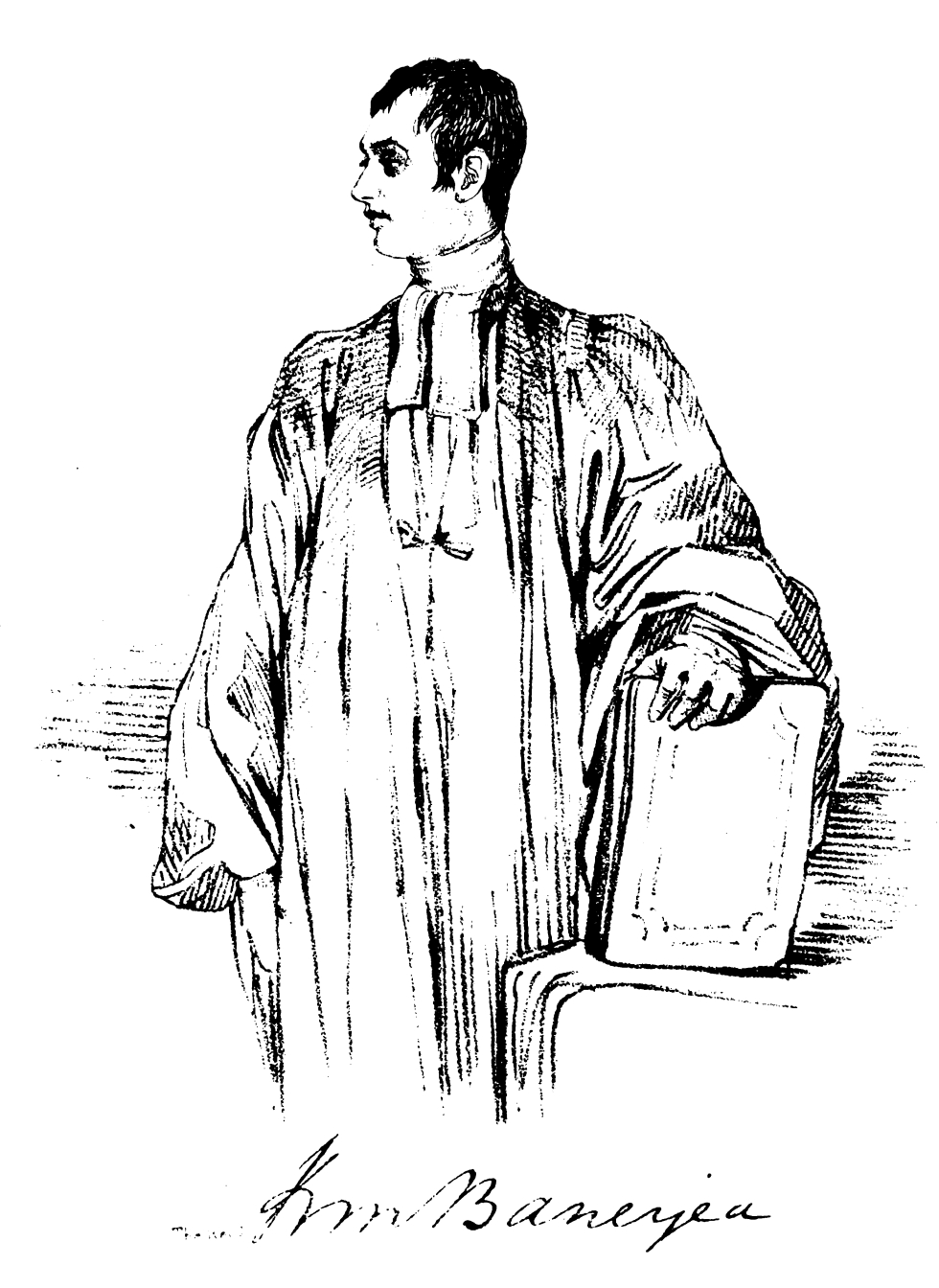 Krishna Mohan Banerjea